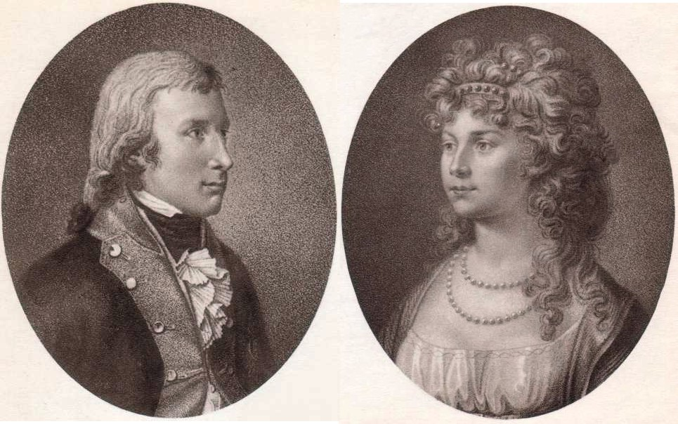 Porträts von König Friedrich-Wilhelm III. von Preußen und Königin Luise.